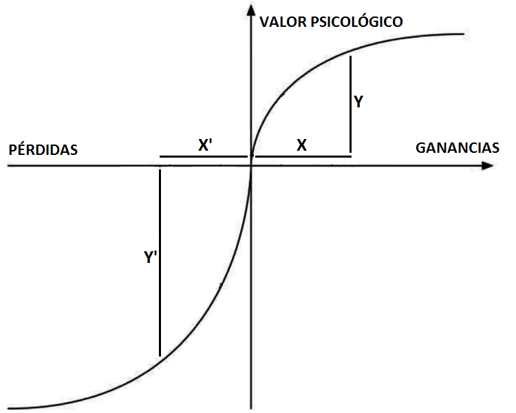 teoria de las perspectivas